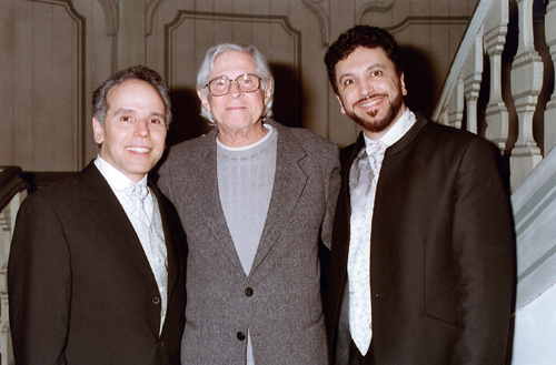 Maximiliano de Brito, Gilberto Mendes, Renato Mismetti